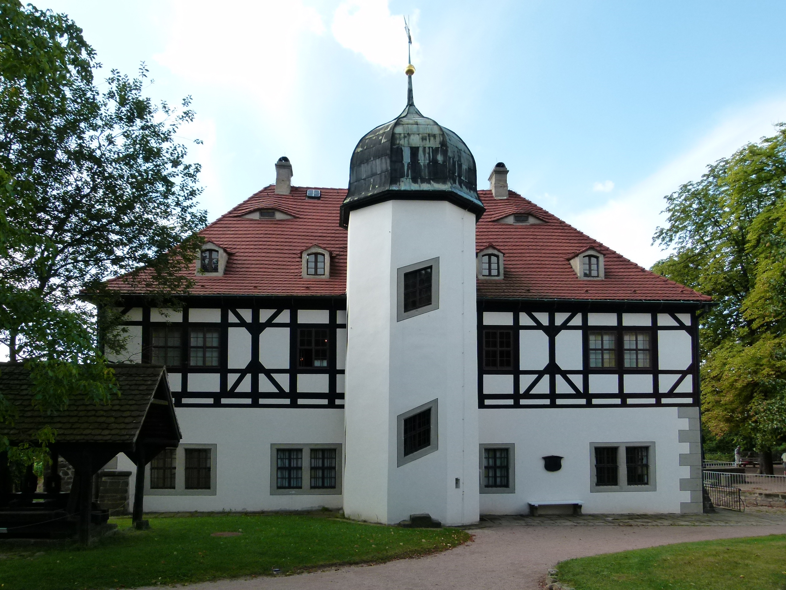 Lust- und Berghaus, Hoflößnitz, Radebeul, Sachsen